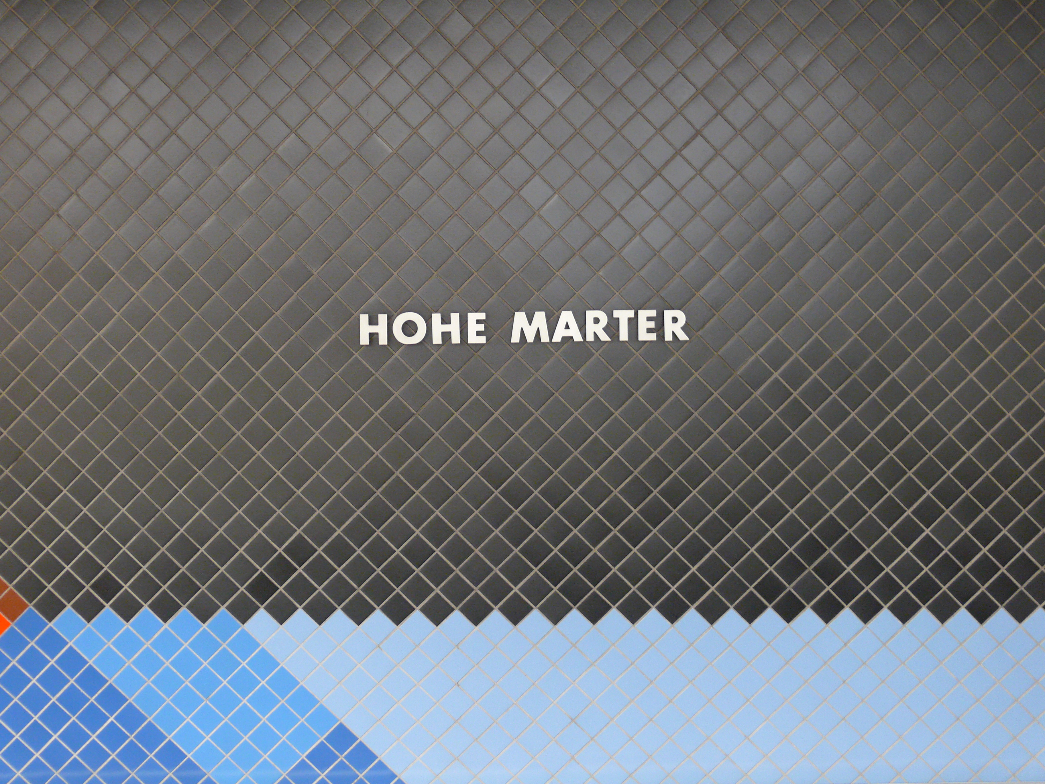 Stationsname an den Bahnsteigwänden am U-Bahnhof Hohe Marter in Nürnberg.